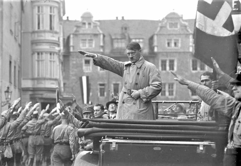 Der grosse Aufmarsch der Nationalsozialisten in Weimar vor dem Führer Adolf Hitler. Anwesend waren der thüringische Innenminister Nationalsozialist Dr. Frick, sowie der nationalsozialistische Reichstagsabgeordnete Dr. Goebbels (Berlin). Vorbeimarsch der nationalsozialistischen Sturmtruppen mit faszistischem Gruss vor ihrem Führer Adolf Hitler (rechts im Bild im Auto stehend) auf dem Marktplatz in Weimar.